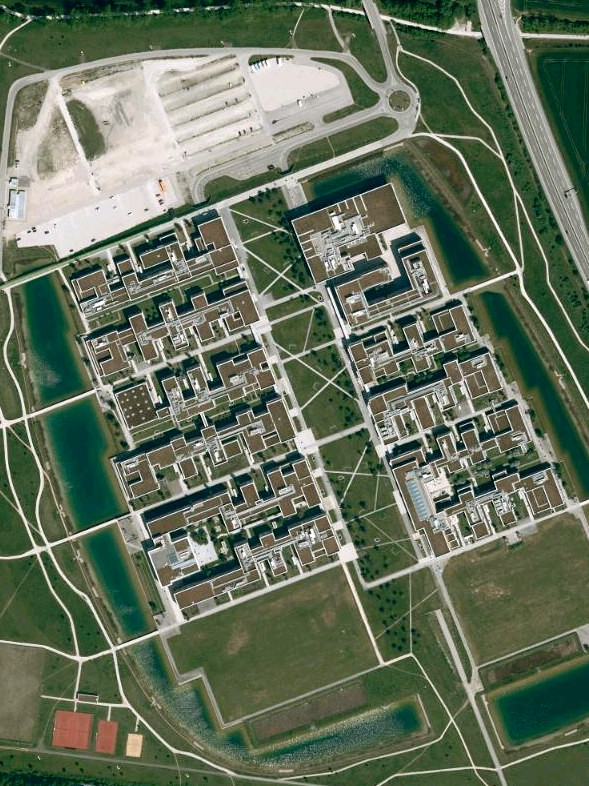 Luftaufnahme der Bayerischen Vermessungsverwaltung: Infineon-Betriebsgelände in Neubiberg, Landkreis München, Bayern.